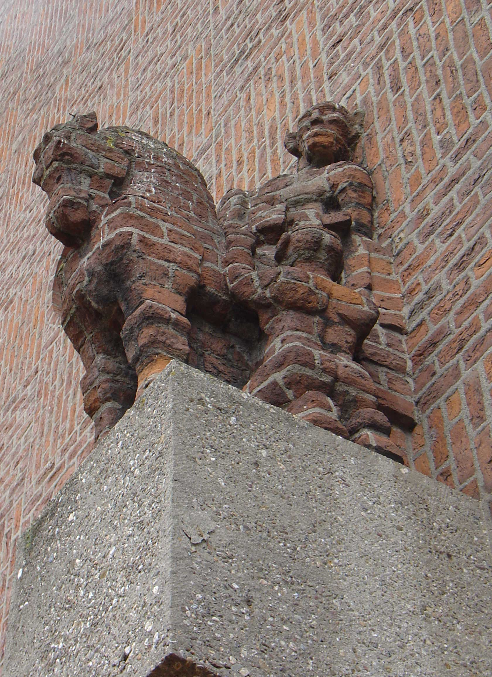 Sint Maarten door Egbert Reitsma Groningen